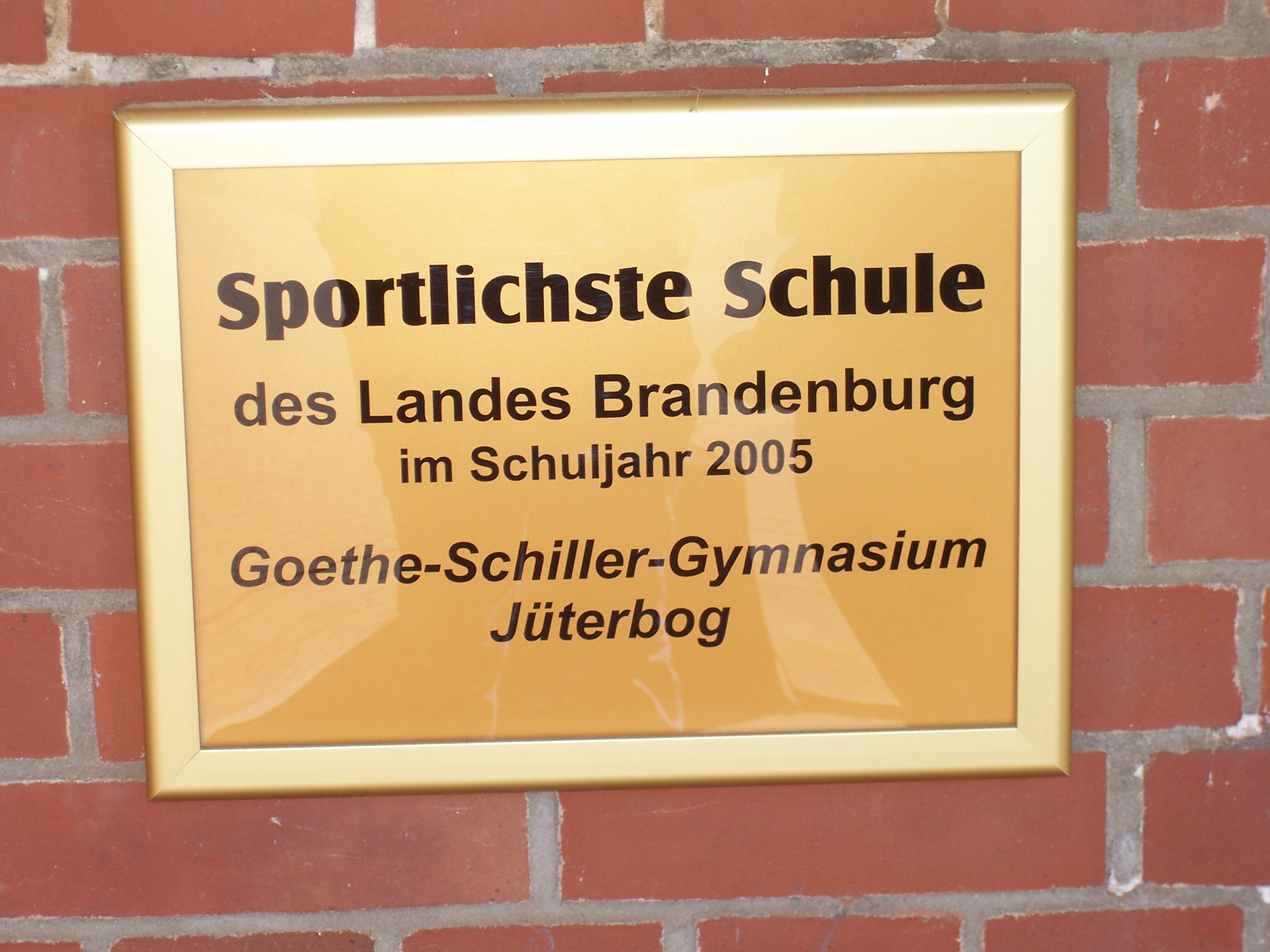 Auszeichnung aus dem Jahre 2005